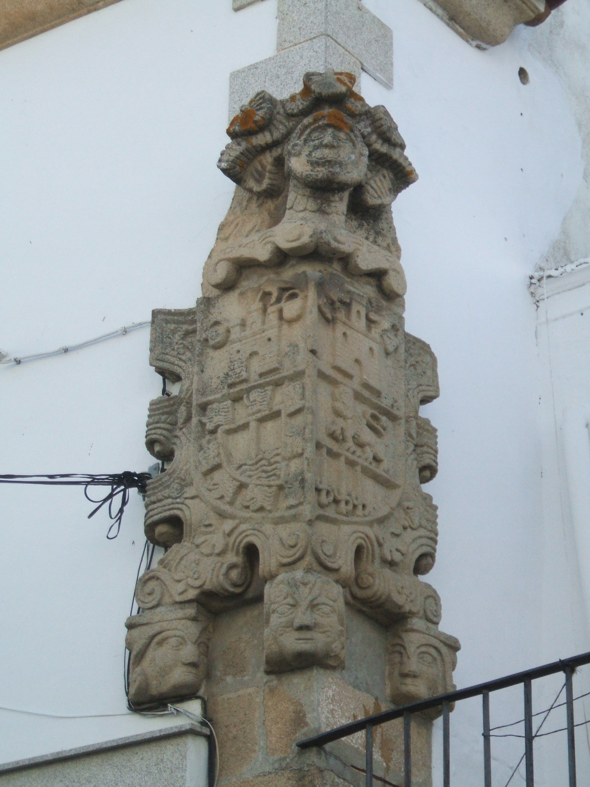 Navas del Madroño